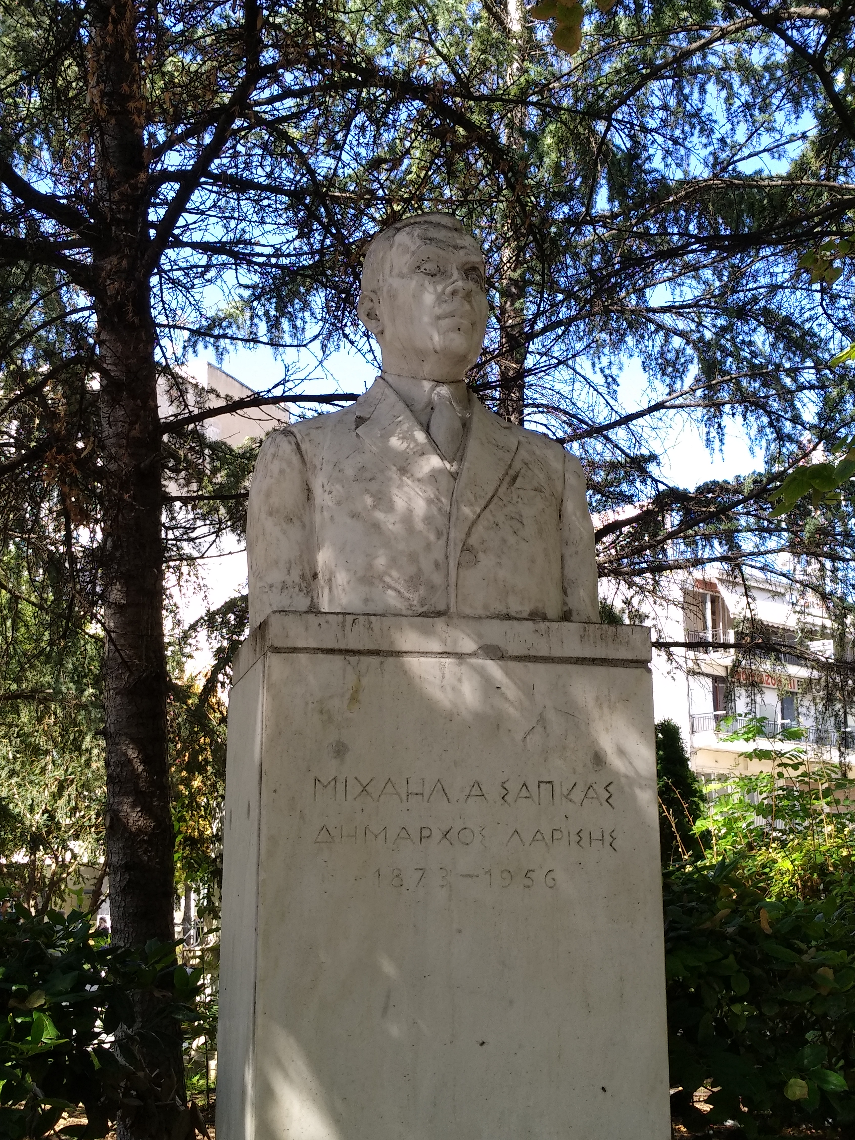 Λάρισα_κεντρικη πλατεία_προτομη σαπκα_1